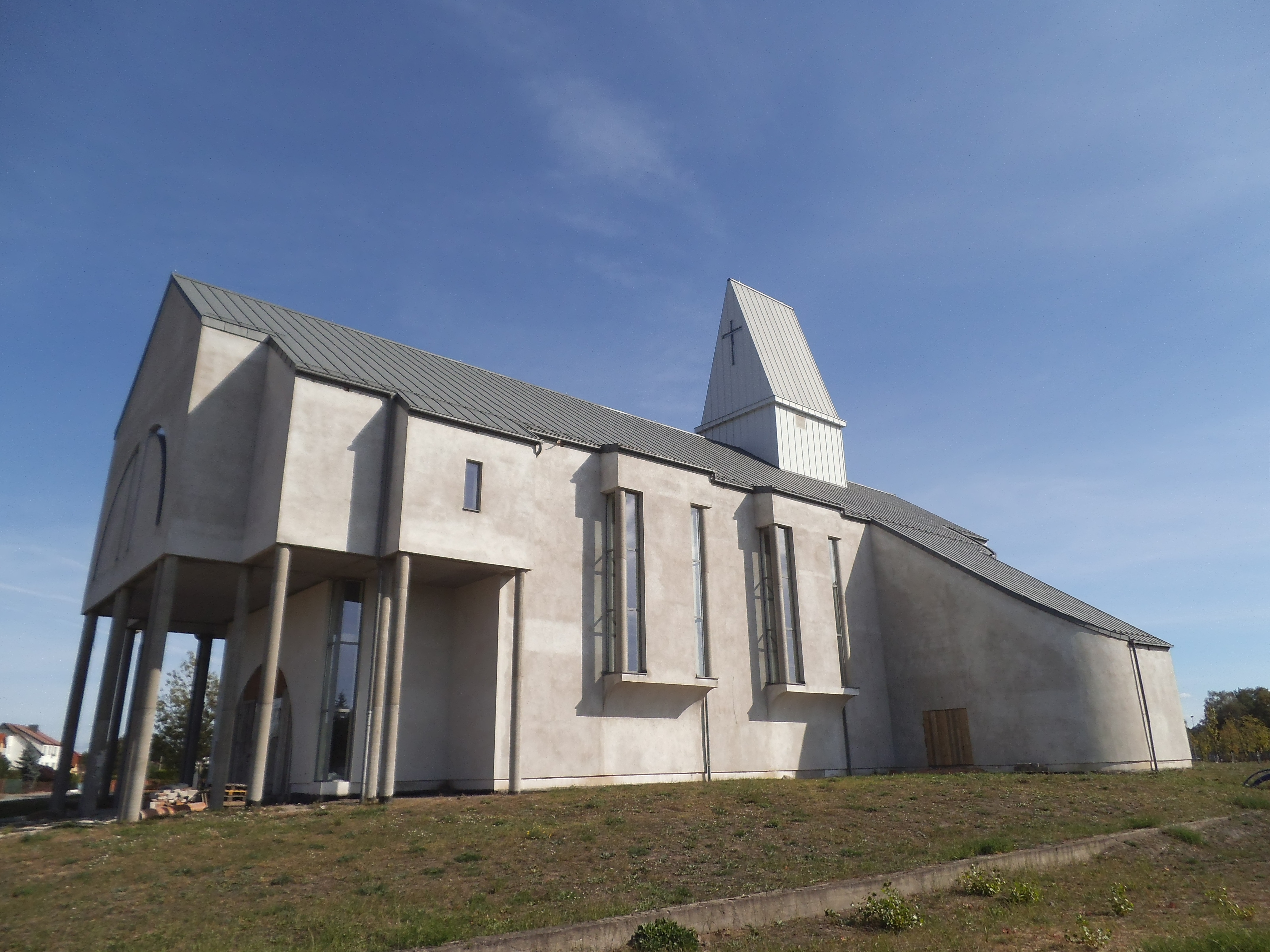 Kościół parafialny pw. Matki Bożej Nieustającej Pomocy w Toruniu